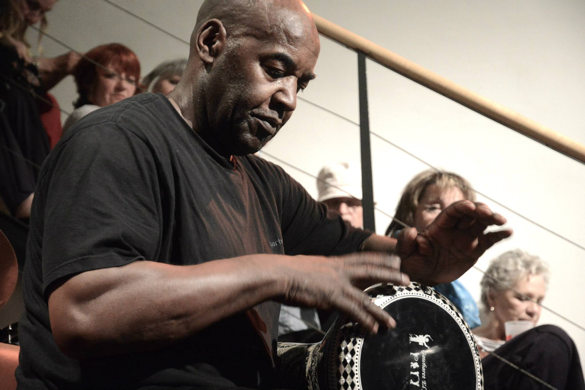 Guem concert